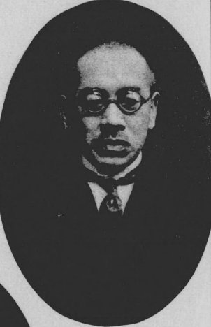 村地信夫（1889-1941）